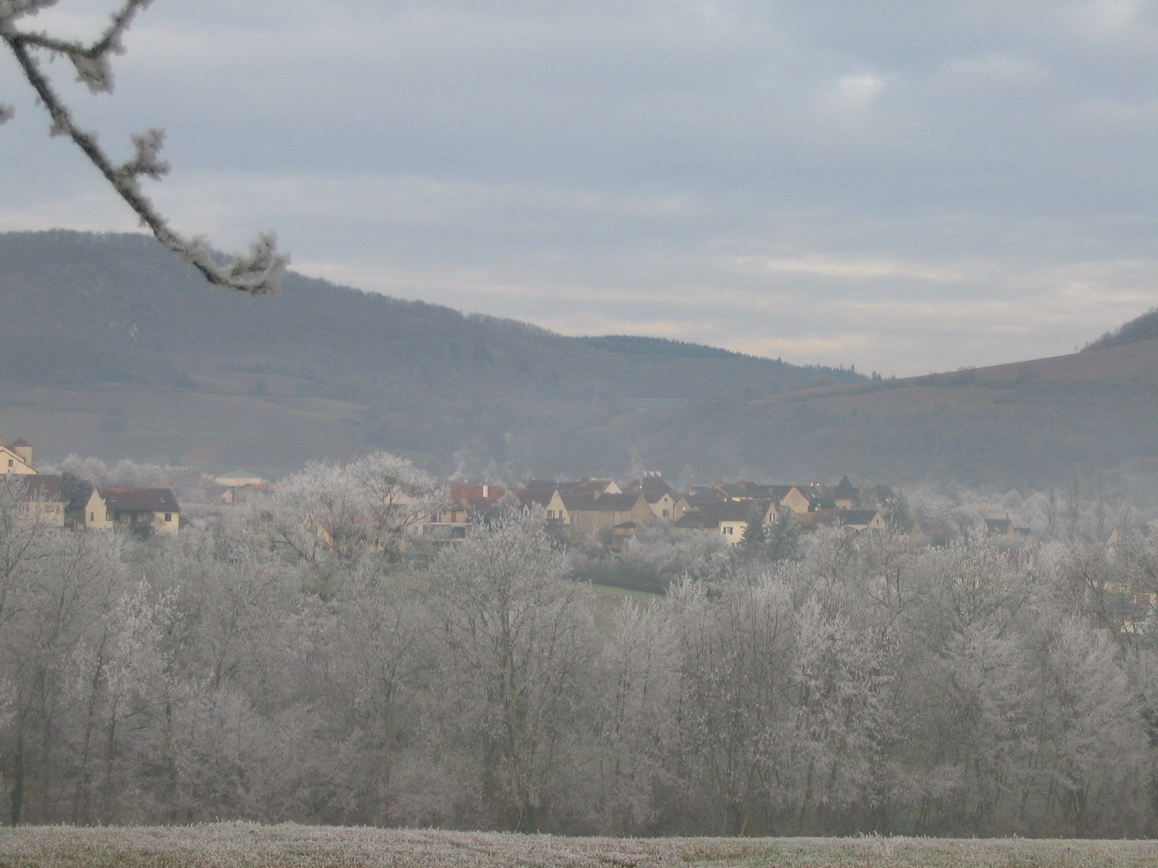 St-Jean de Vaux en hiver, depuis la D48 (vallée de l'Orbise).